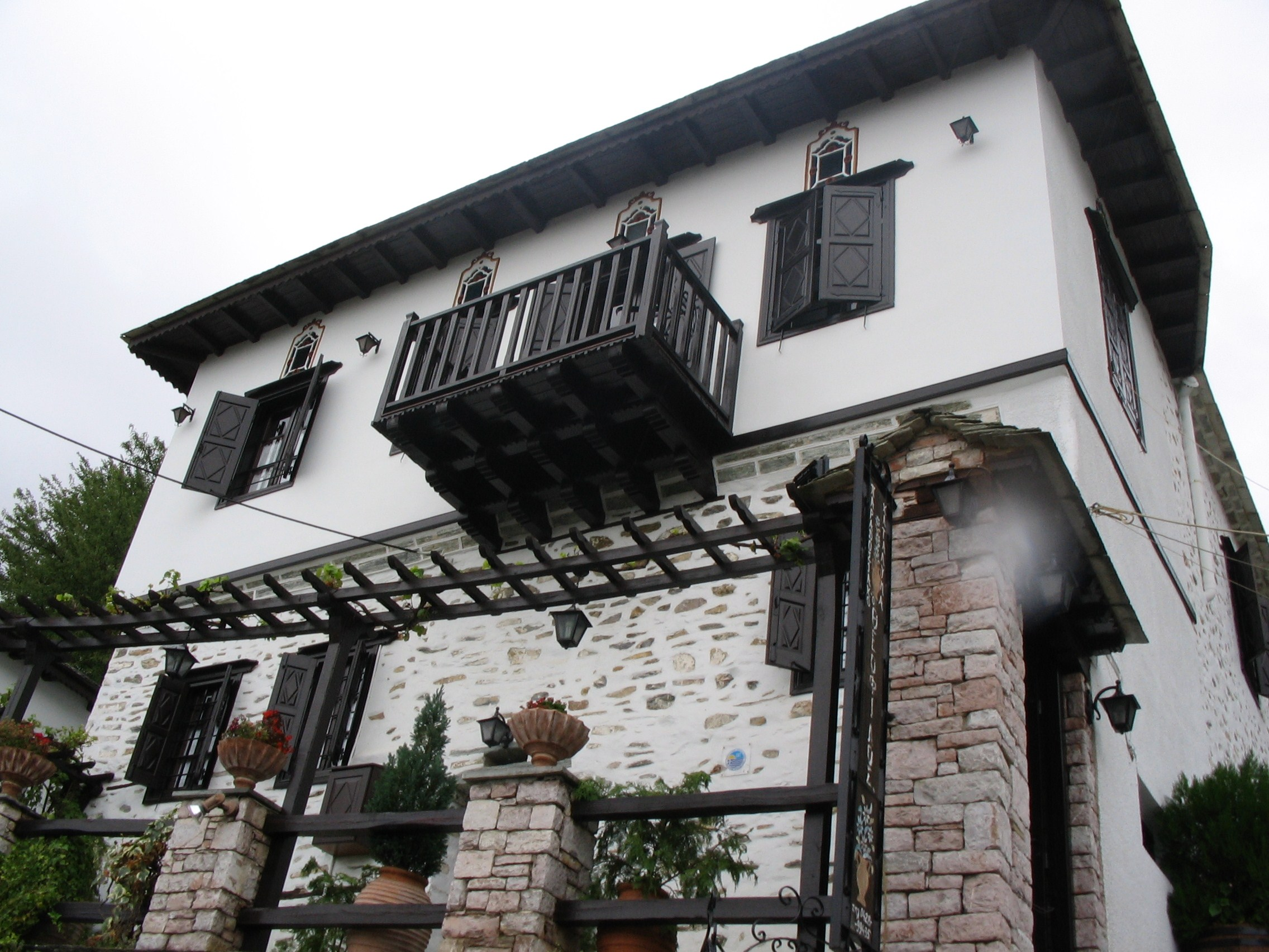 Деревня Макриница на полуострове Пилио, Греция. Типичный для этой деревни каменный белённый дом с деревянными ставнями и балконами.